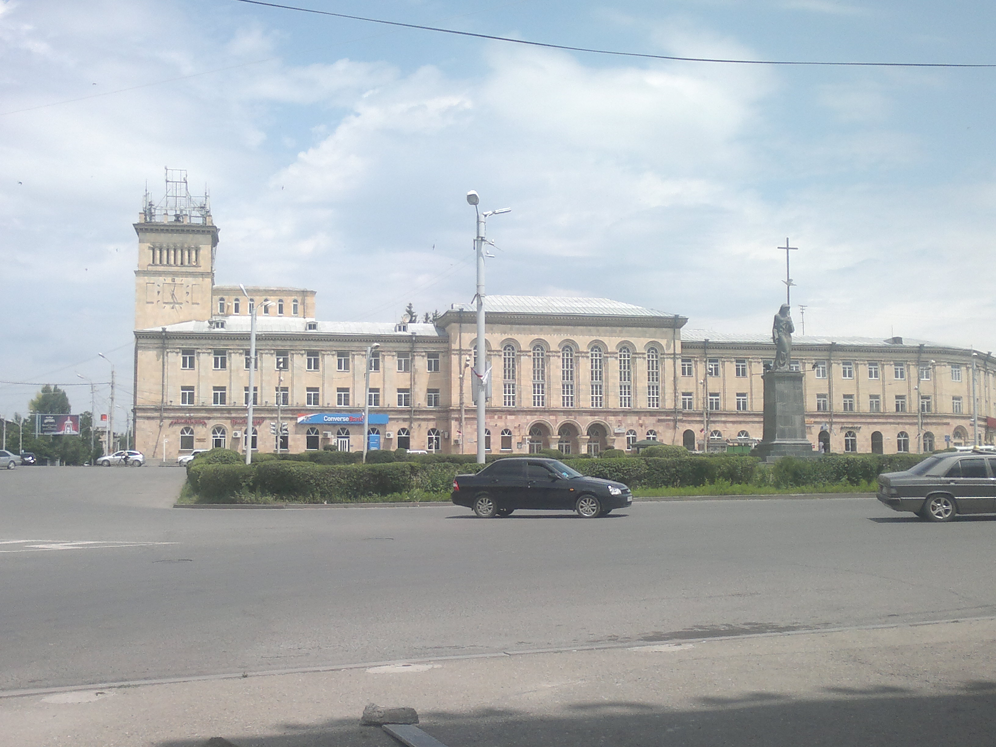 Գյումրու Անկախության հրապարակ